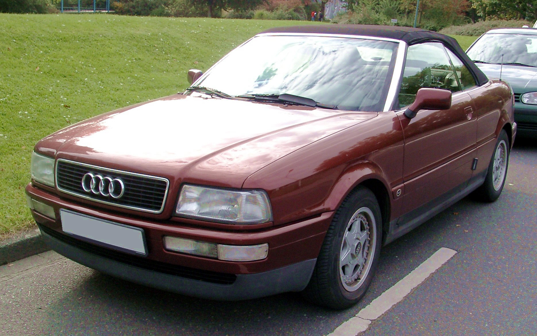 Audi 80 B4 Cabrio